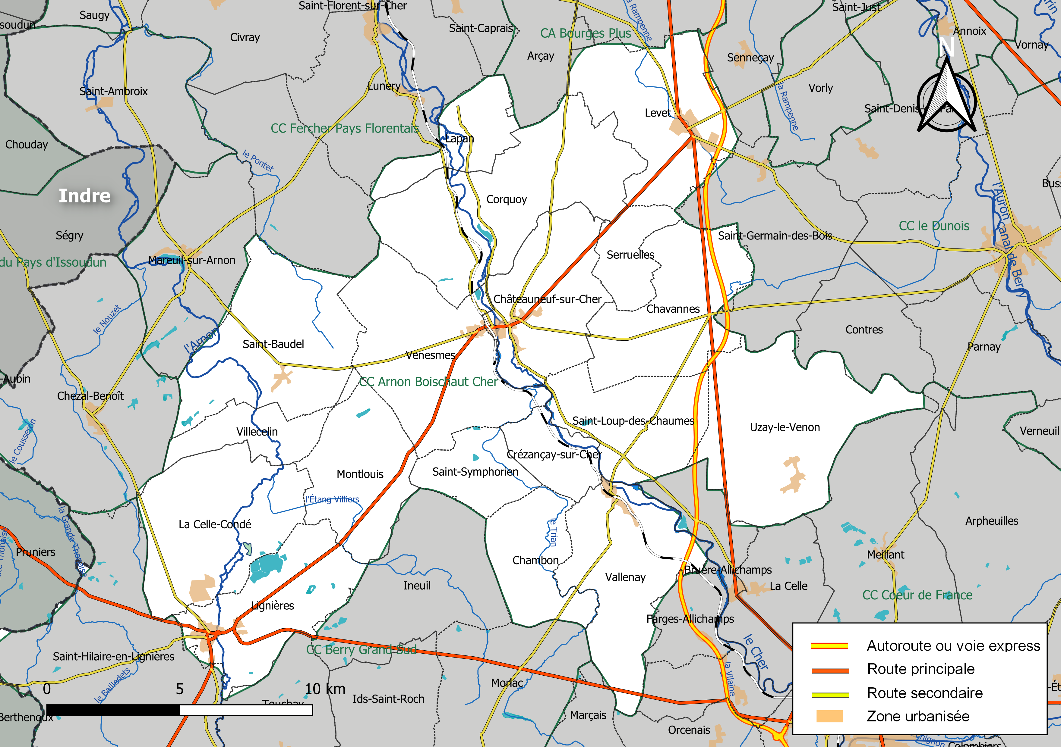 Carte géographique de la communauté de communes Arnon Boischaut Cher, département du Cher, France. Composition au 1er janvier 2019.